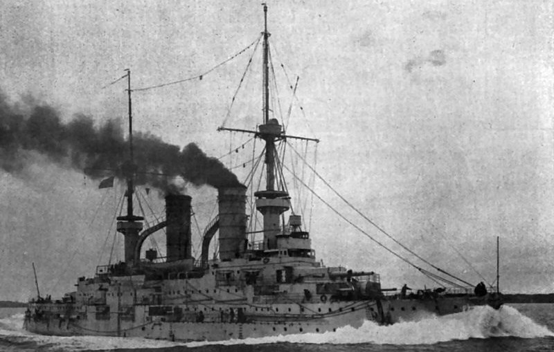 SMS Mecklenburg ein Schlachtschiff der Wittelsbach-Klasse, ca. 11.700t Tonnage, 1903 - 1921